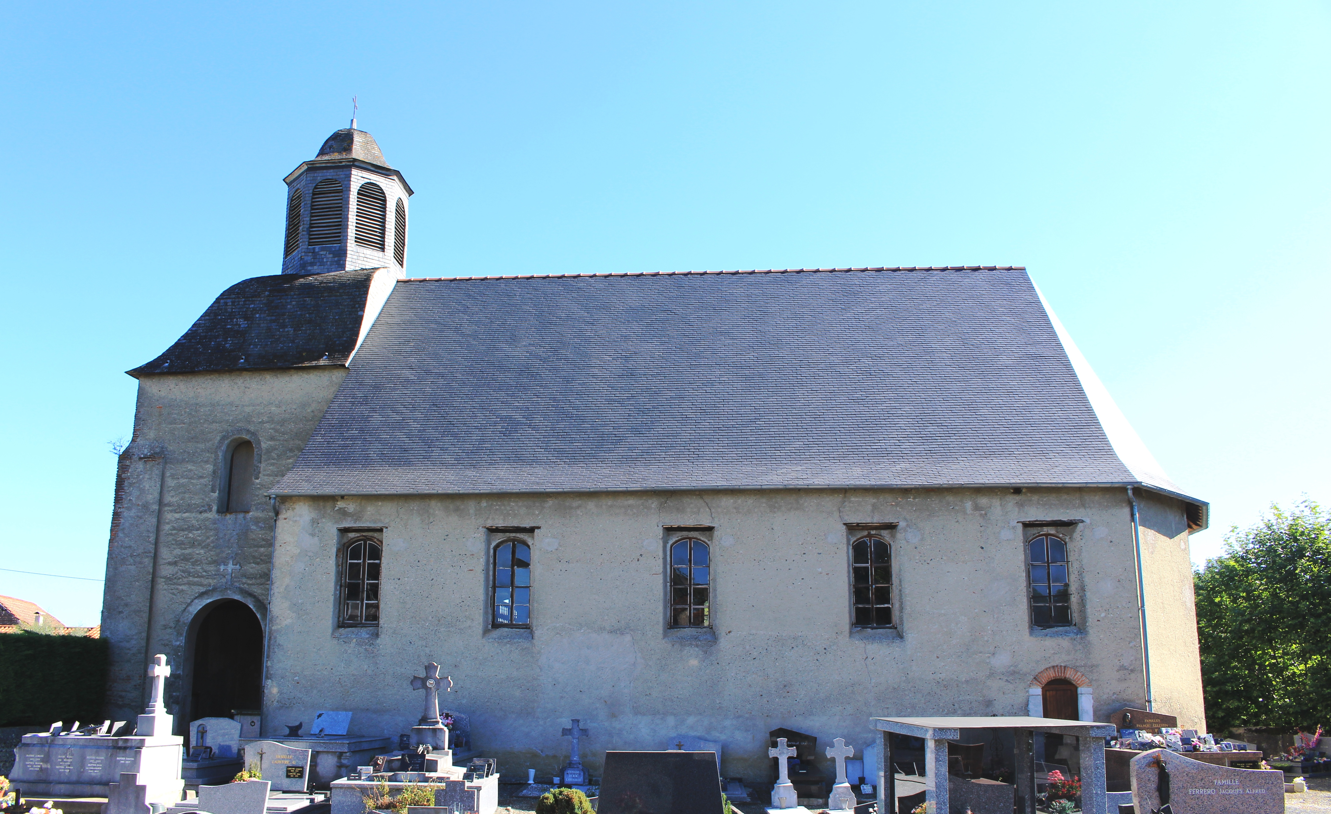 Église Saint-Pierre de Sarniguet (Hautes-Pyrénées)